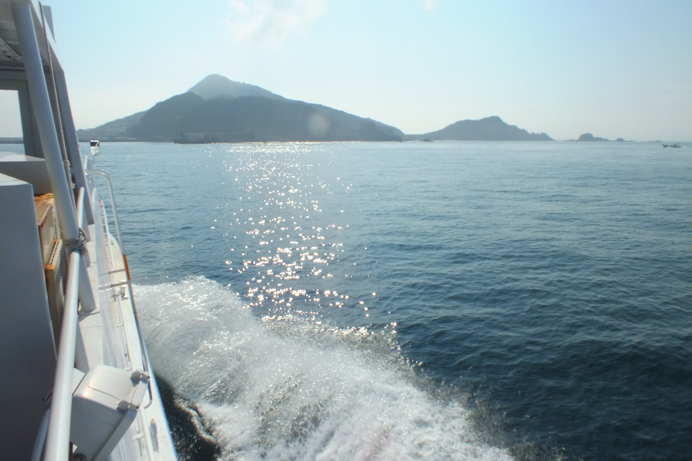 kamishima 神島（三重県） 鳥羽市営定期船